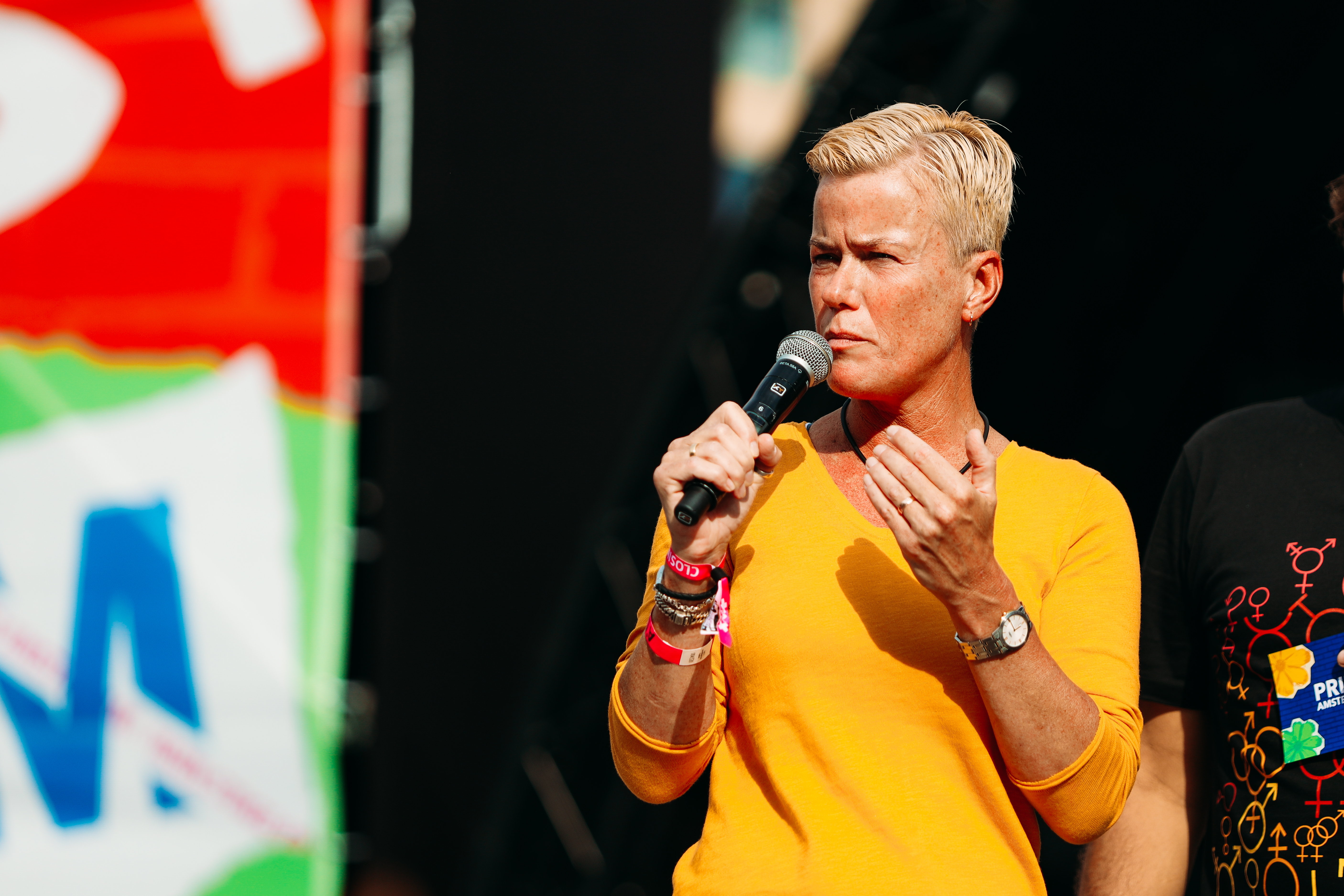 Ellie Lust tijdens de closing party van Pride Amsterdam 2019